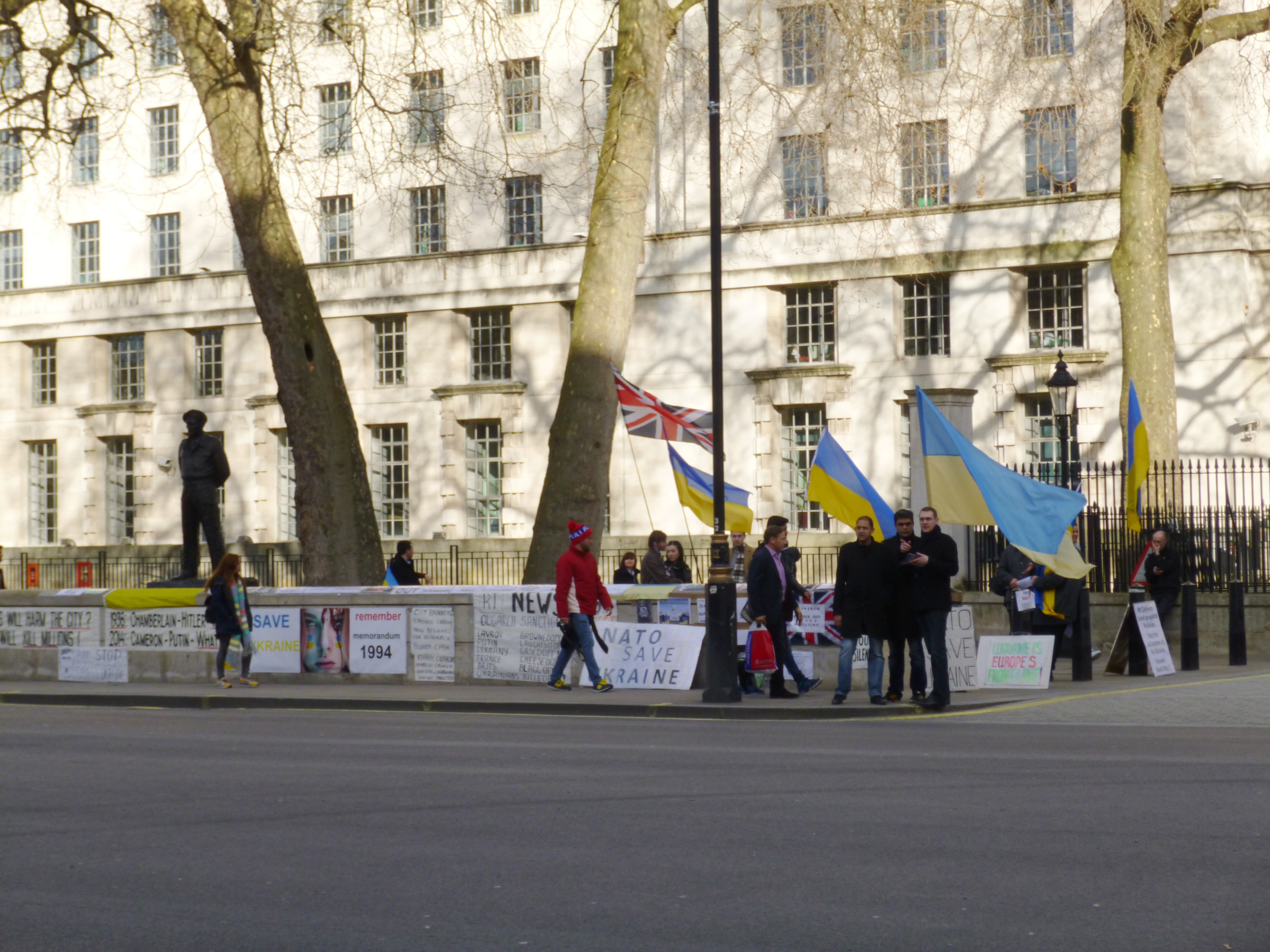 Pikieta Ukraińców w Londynie 07-03-2014